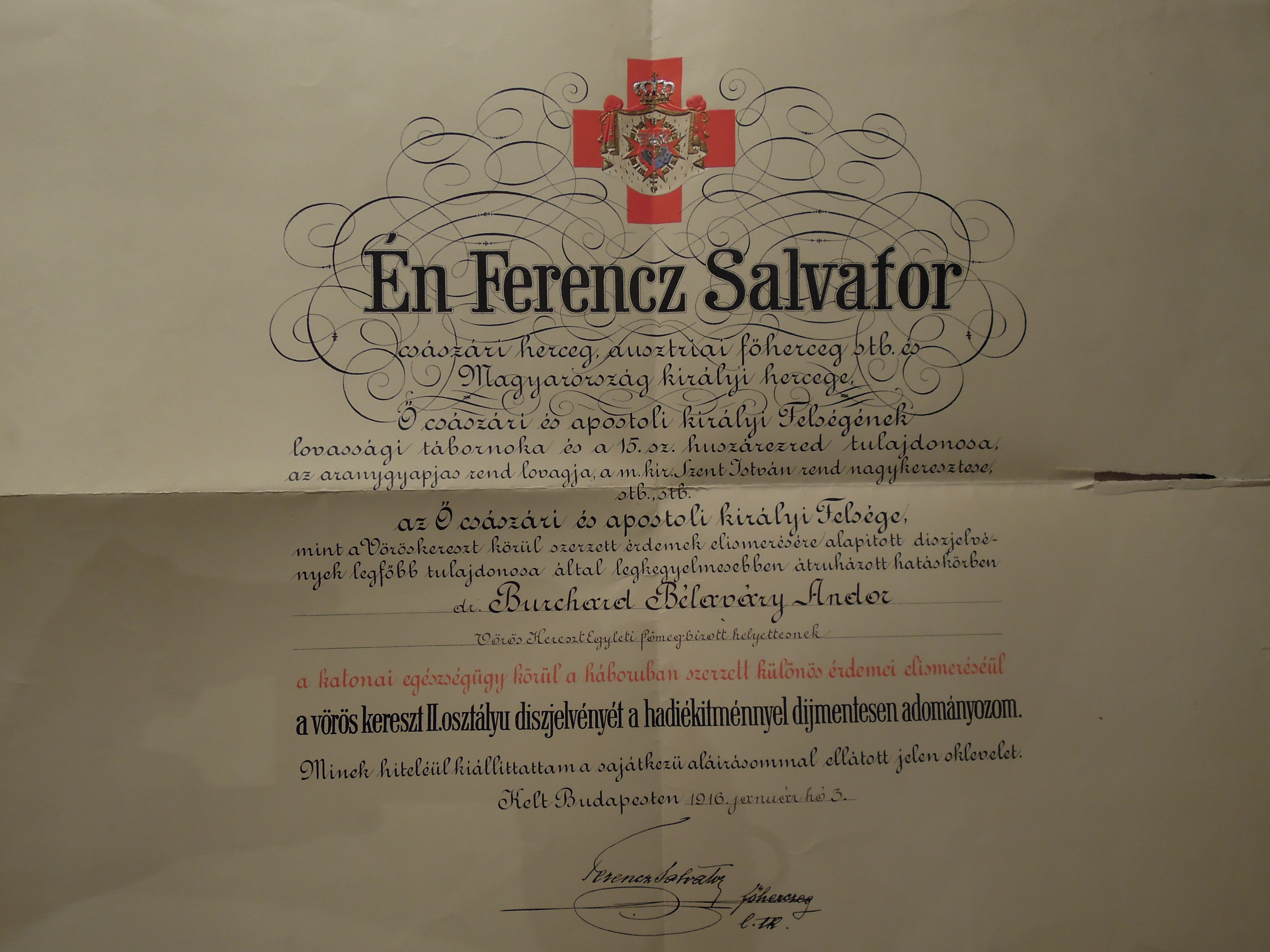 Certificat de décoration de la Croix rouge austro-hongroise, 2e classe avec ornement de guerre, 1916. Attribué au Dr Andor Burchard-Belavary, haut-commissaire adjoint de la Croix rouge hongroise.